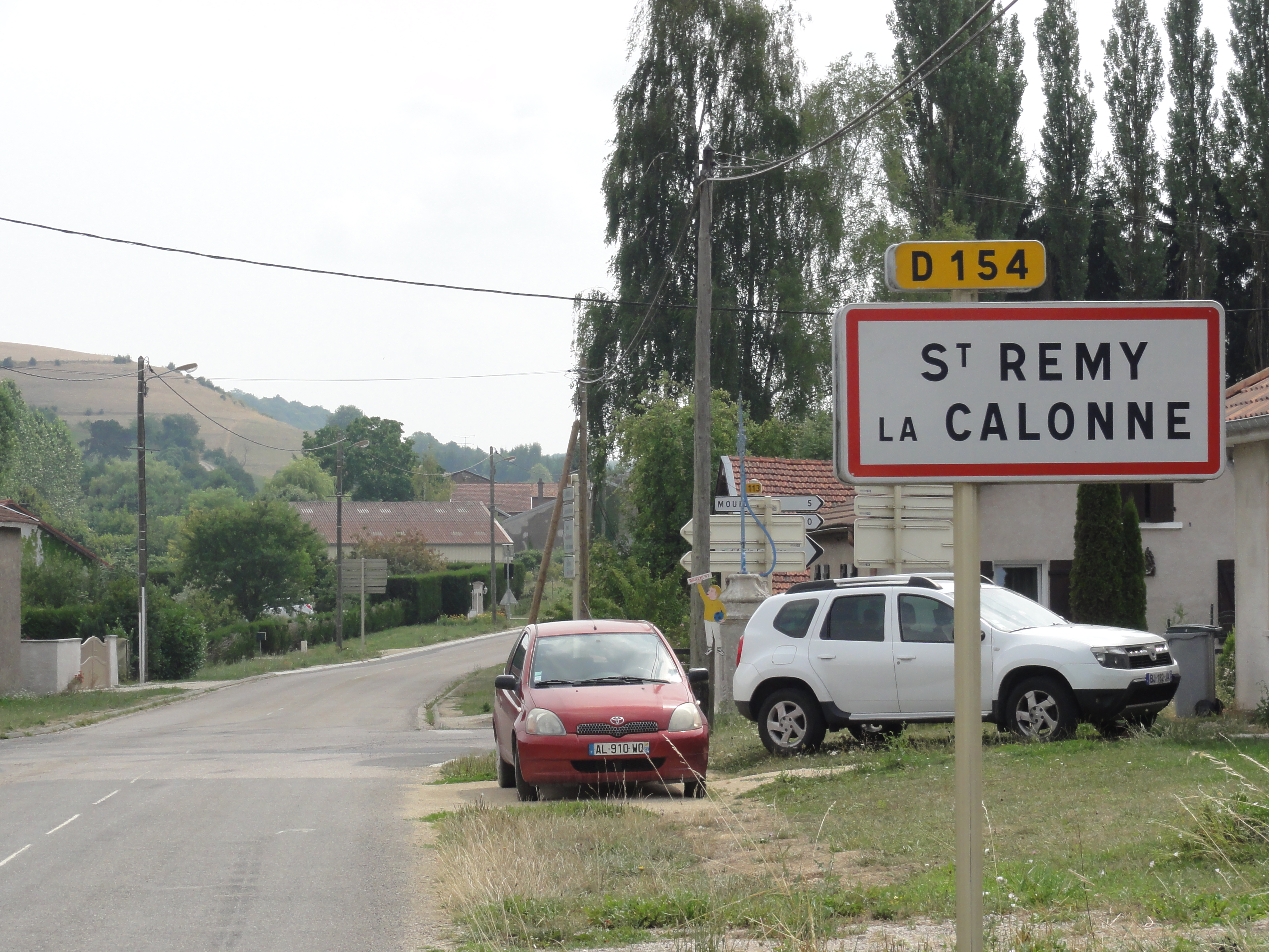 Saint-Rémy-la-Calonne (Meuse) city limit sign